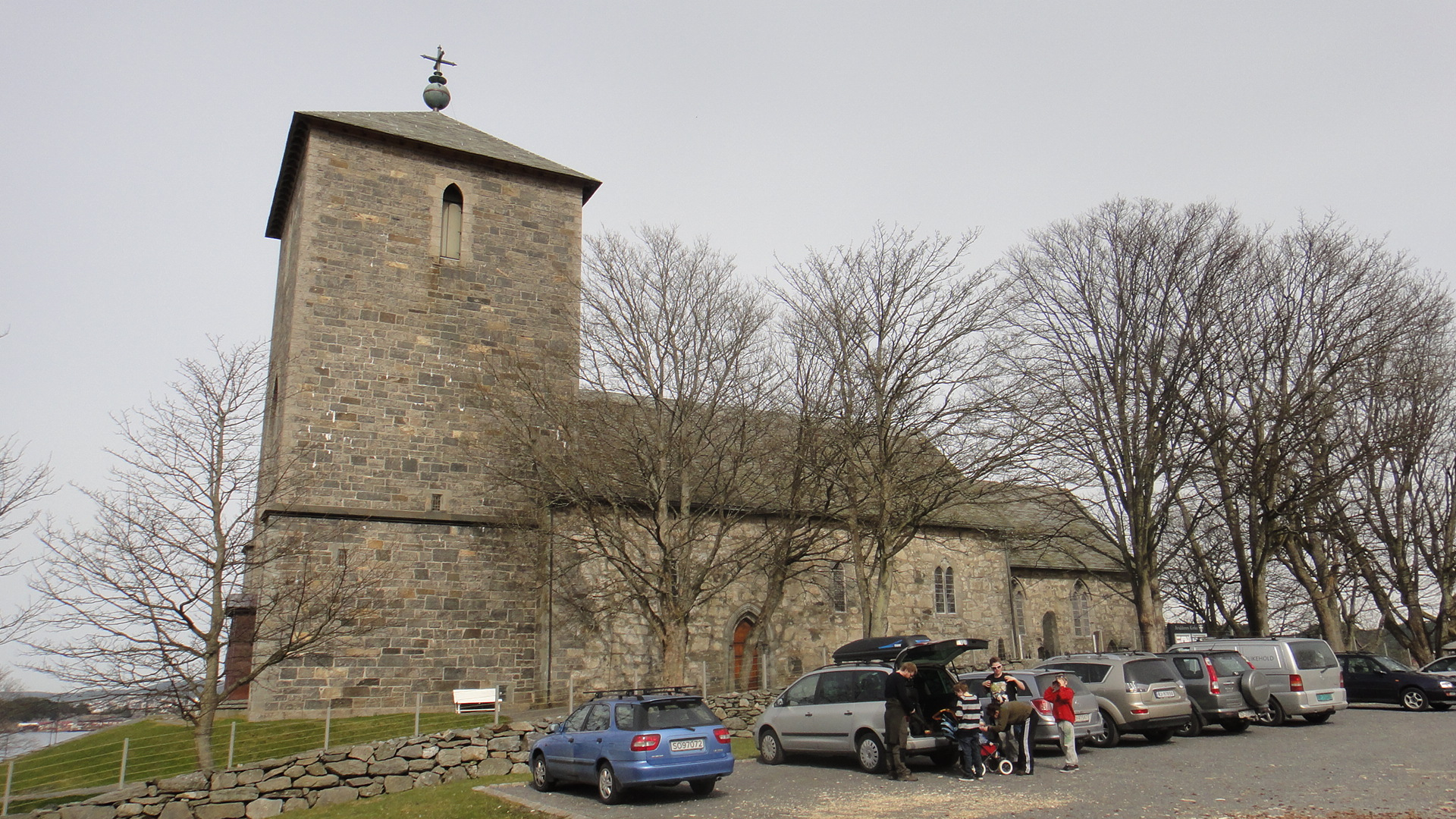 Norvège, Rogaland, Eglise d'Avaldsnes